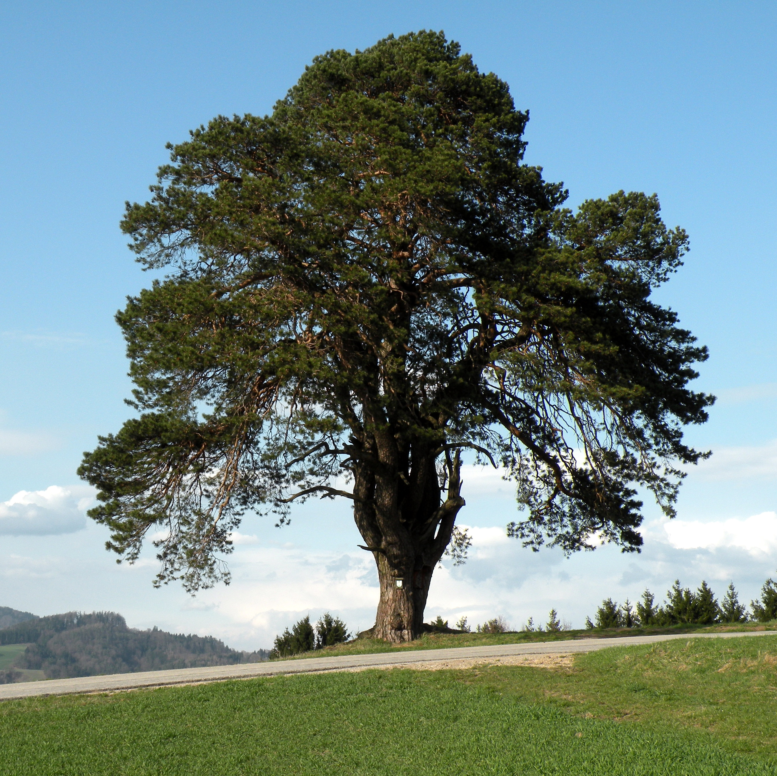 Naturdenkmal Koppler-Föhre in Münzbach im Bezirk Perg in Oberösterreich